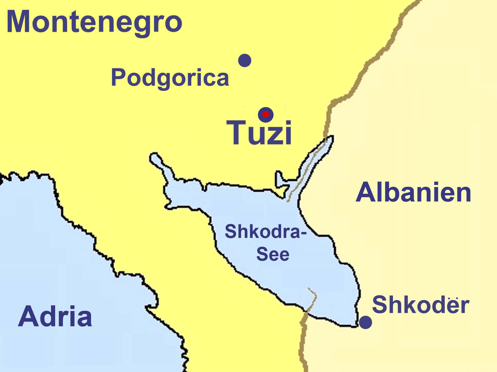 Tuzi in Montenegro, Lageskizze